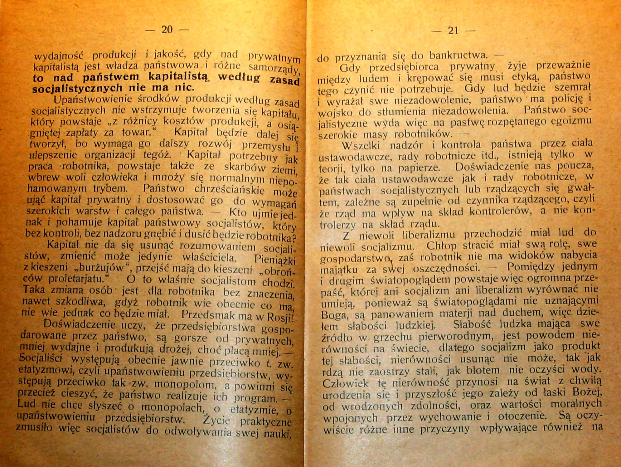 Stanisław Krzyżowski, Rozmyślania w czterdziestą rocznicę encykliki „Rerum novarum”, wydanej 15 maja 1891 r. przez papieża Leona XIII, Pszczyna 1931